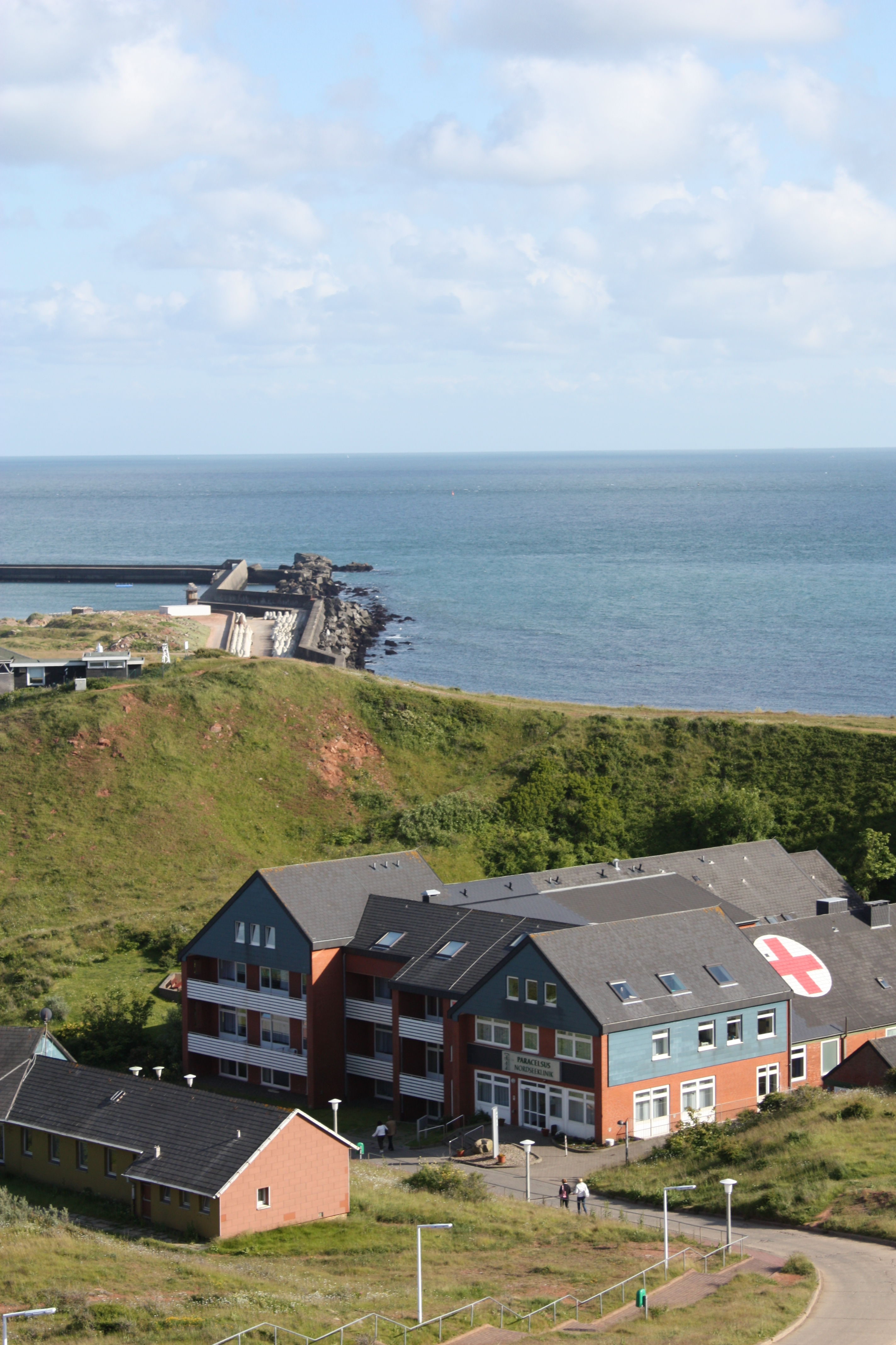 Heligoland, Helgoland